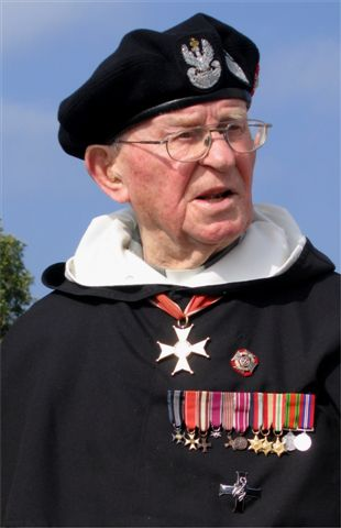 Adam Studziński (1911-2008)